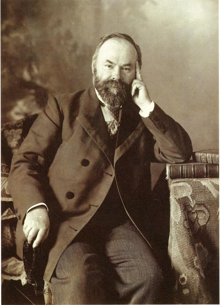 Щукин, Пётр Иванович